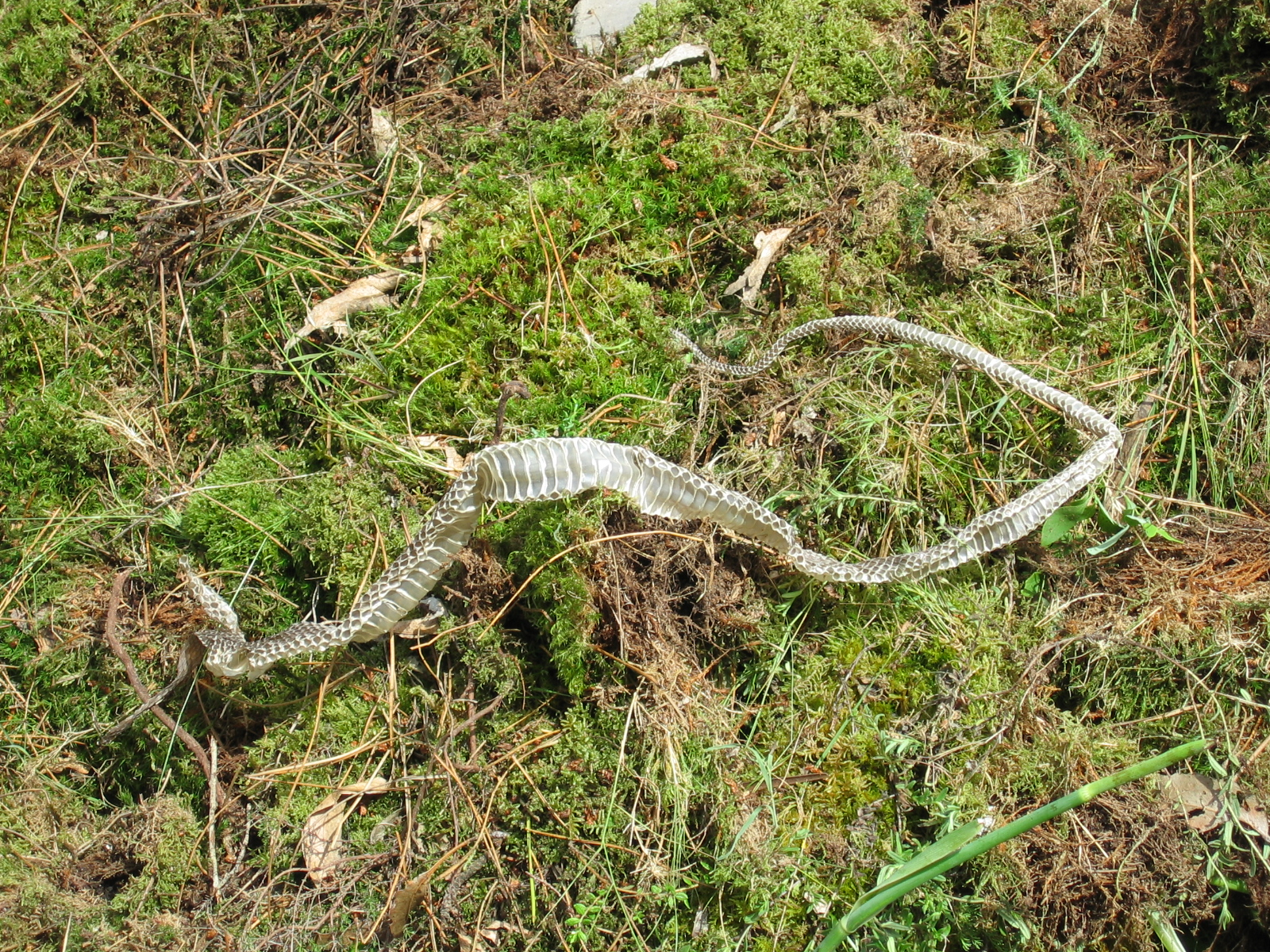 Camisa de cobra, usada na medicina tradicional galega.